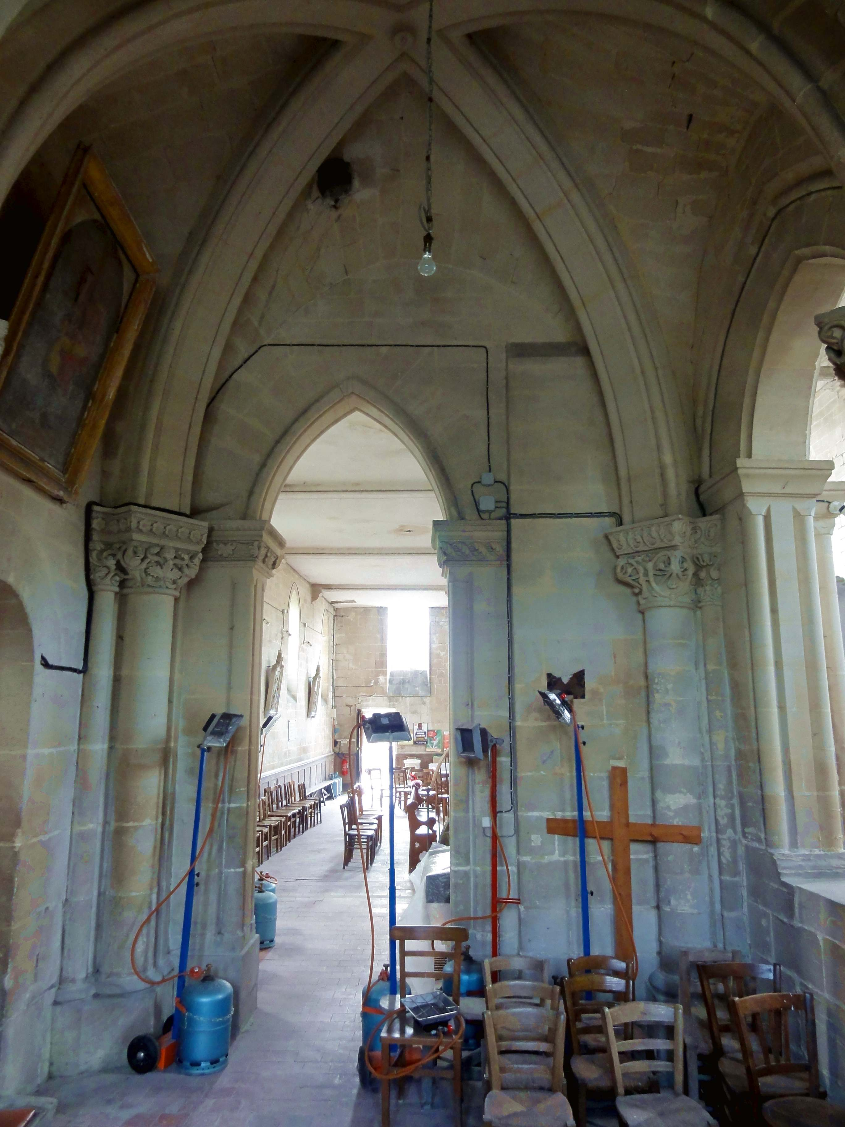 Intérieur de l'église (voir titre).